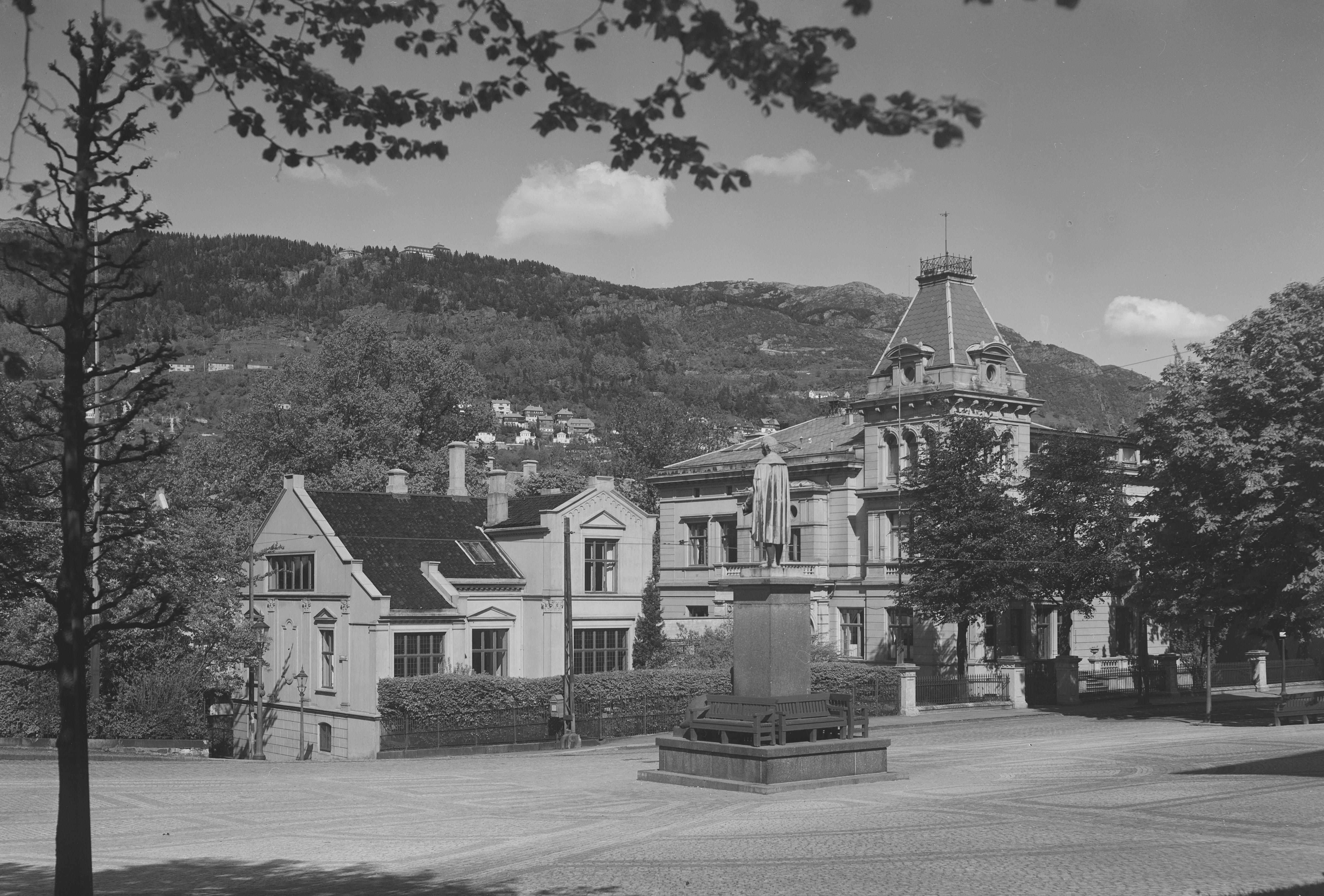 Bildet er hentet fra Nasjonalbibliotekets bildesamling. Anmerkninger til bildet var: Fotograf : ukjent Bergen, Bergen, Hordaland